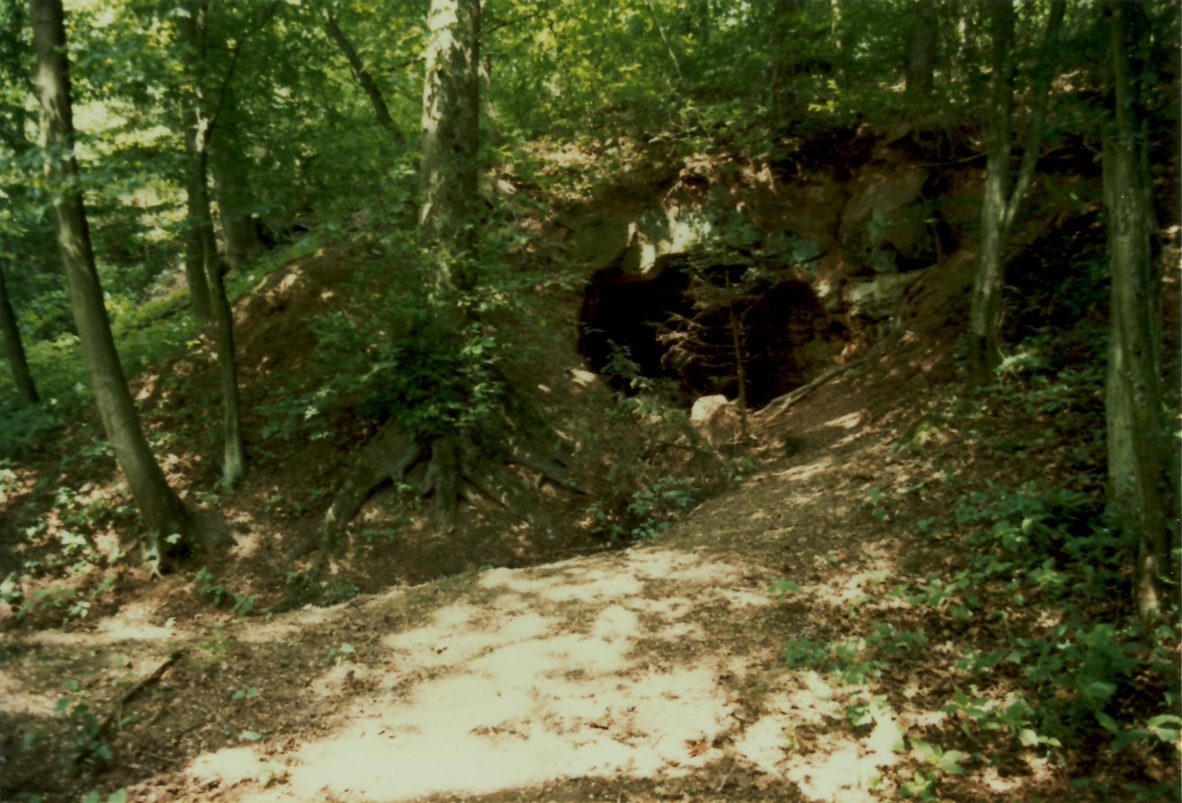 Aurachtal zwischen Geichsenhof und Steinhof (Mittelfr.)